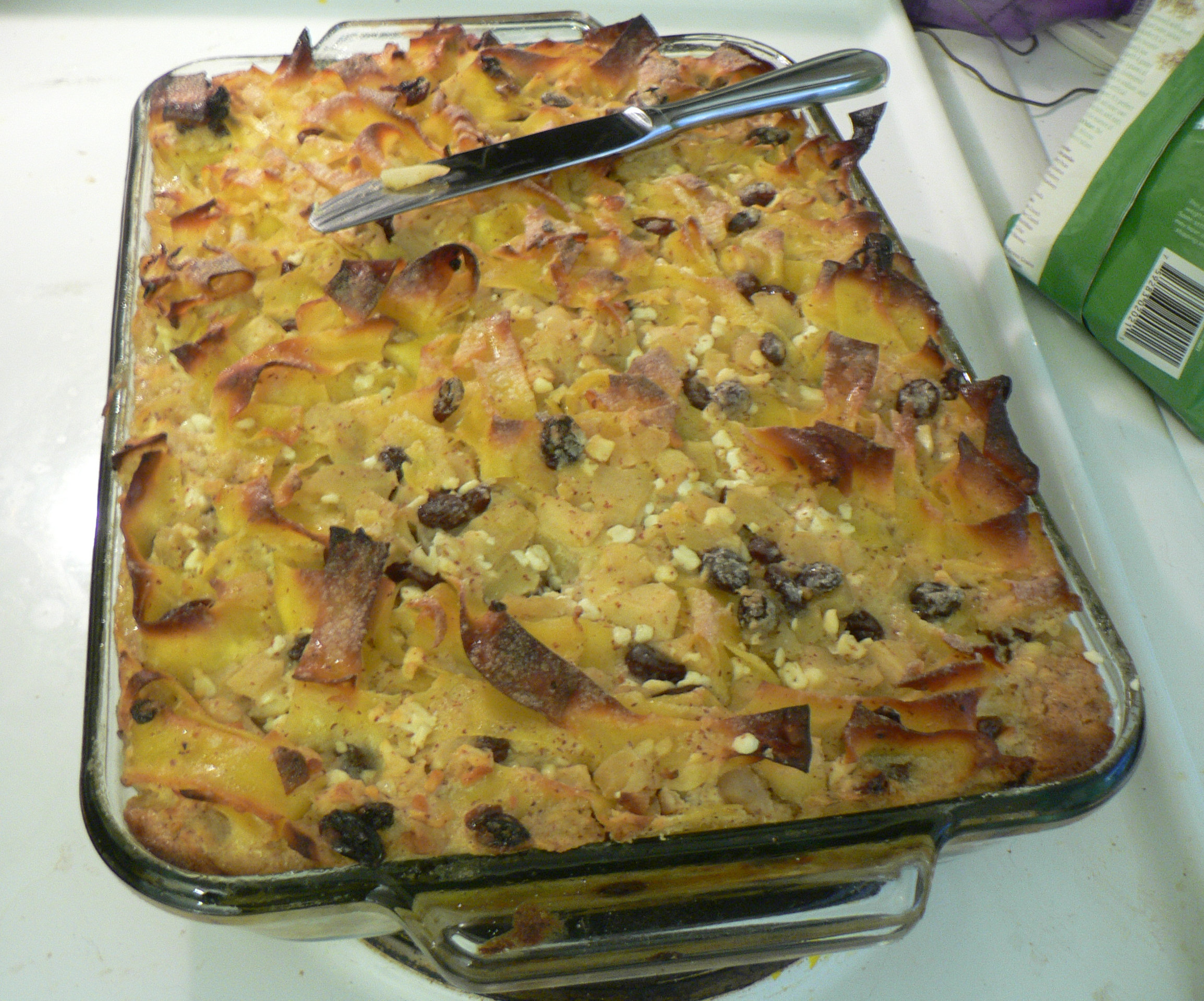 Kugel made from egg noodles